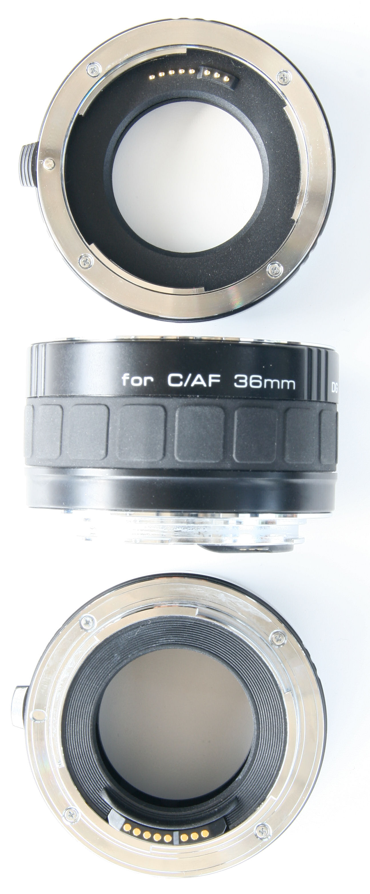 Zwischenring